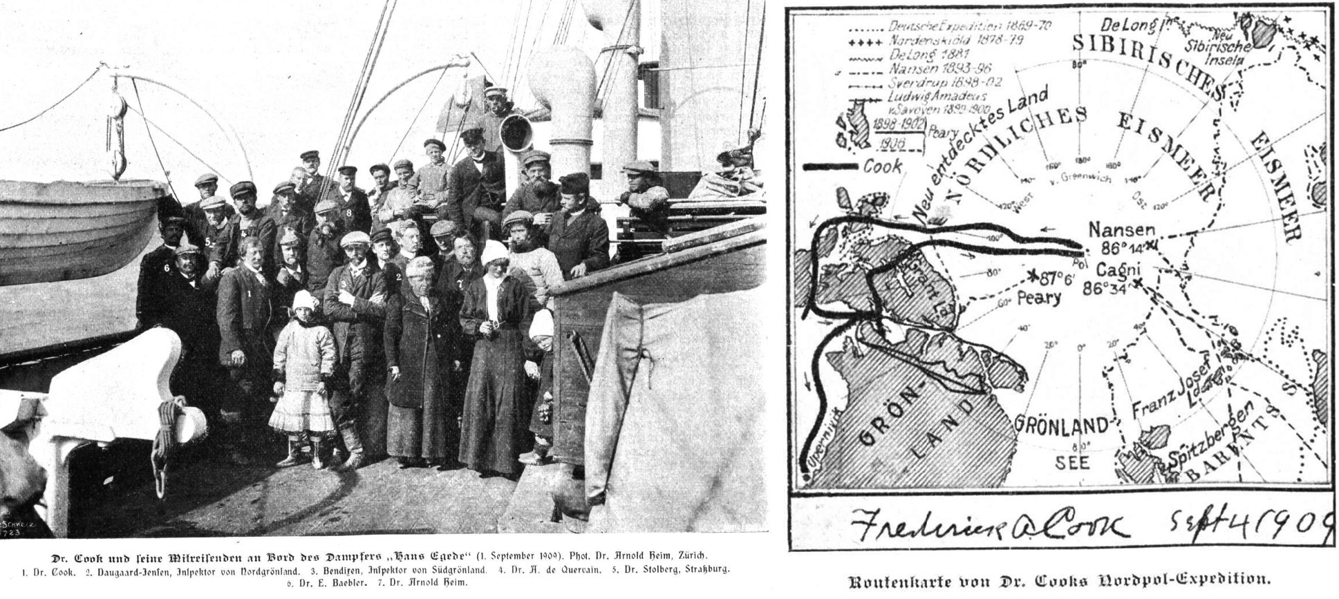 Grönlandexpedition von 1909. Passagiere auf dem Schiff, Hans Egede, Frederick Cook